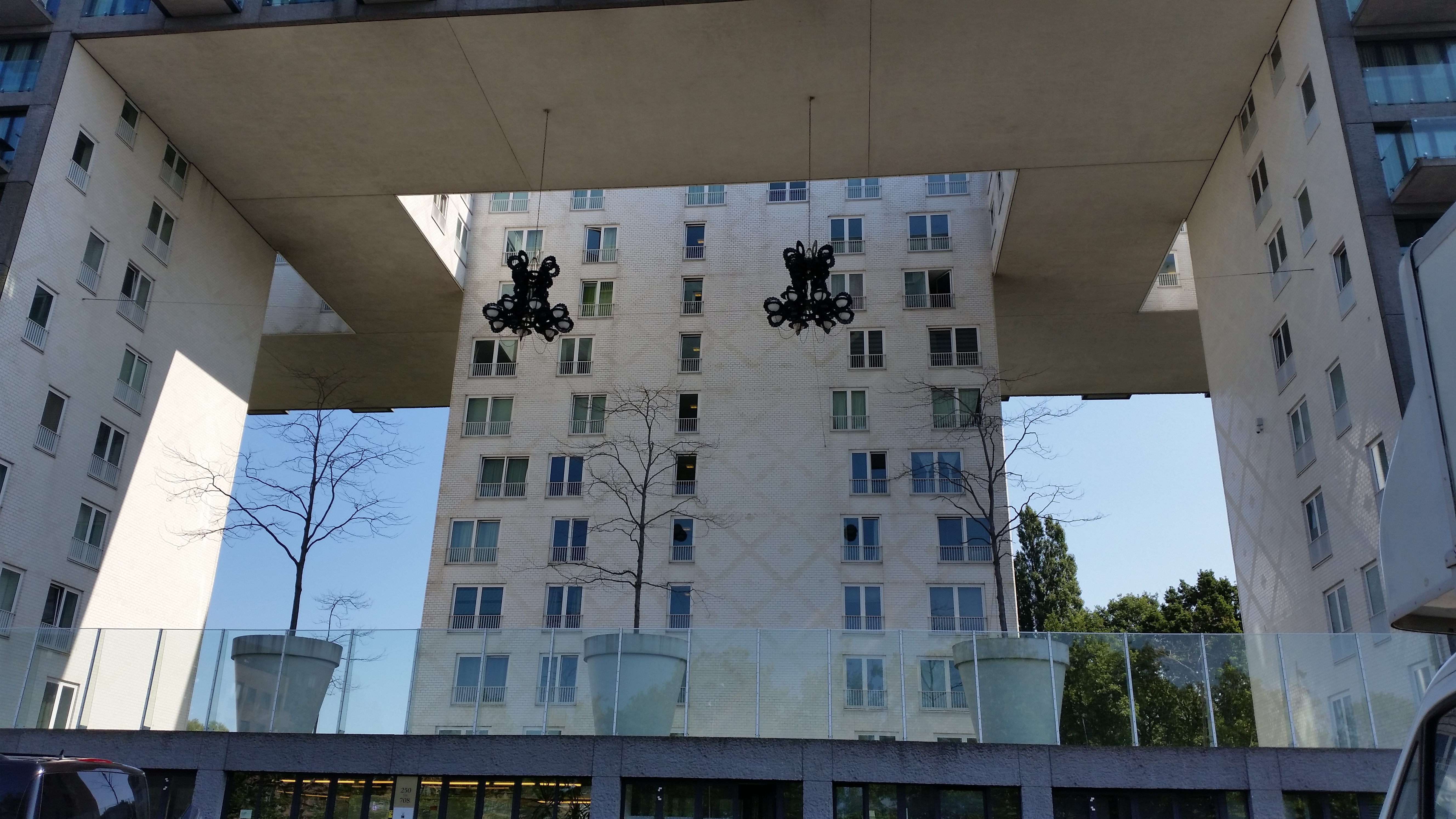 Bloempotten en kroonluchters in Parkrandgebouw aan de Dr. H. Colijnstraat, Amsterdam Nieuw-West, Geuzenveld